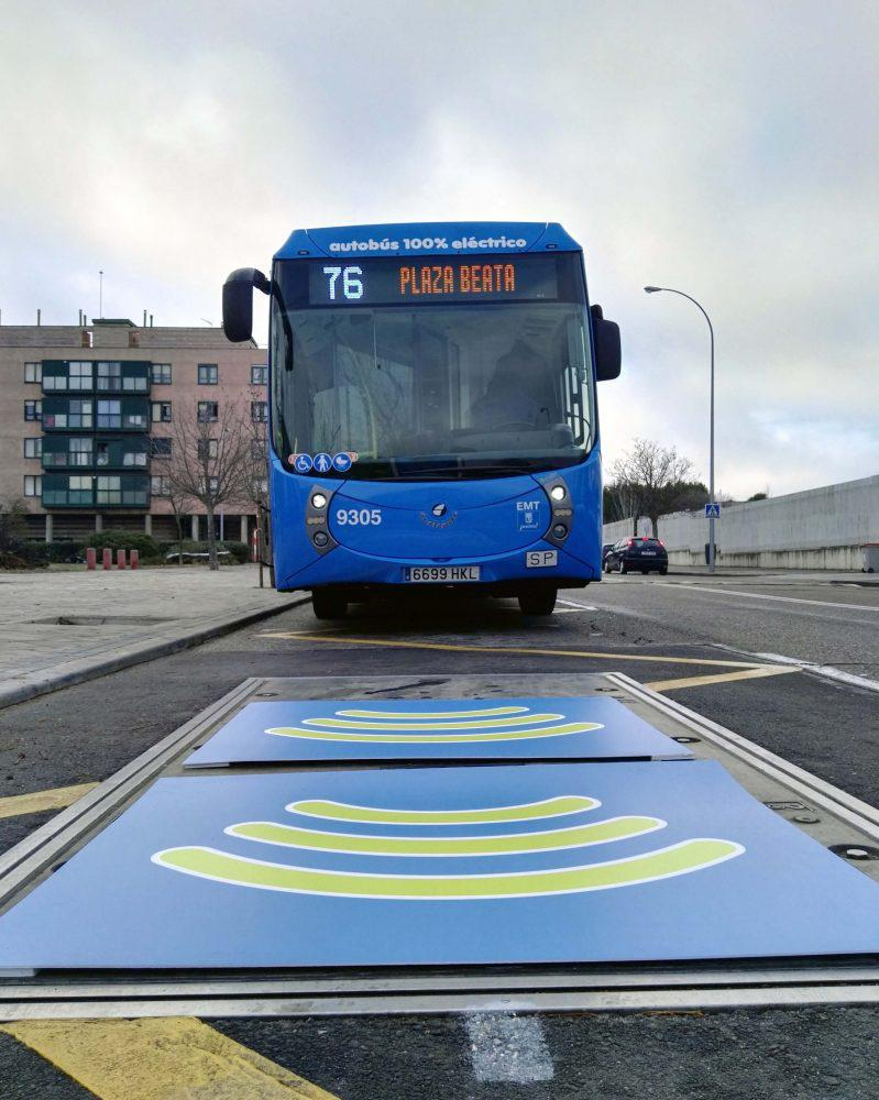 La línea 76 de la Empresa Municipal de Transportes de Madrid, que cubre el trayecto entre la plaza de la Beata y Villaverde Alto, será la primera línea de autobuses de España servida íntegramente por autobuses eléctricos con sistema de recarga por inducción. La alcaldesa de Madrid, Manuela Carmena; la delegada de Medio Ambiente y Movilidad y presidenta de EMT, Inés Sabanés; el concejal de Villaverde, Guillermo Zapata; la concejala de Usera y Arganzuela, Rommy Arce, y el gerente de EMT, Álvaro Fernández Heredia, han presentado hoy viernes, 29 de diciembre, los vehículos eléctricos que incorporan este innovador sistema de recarga inductiva de oportunidad. Una vez finalizado el desarrollo de este ambicioso proyecto y concluido satisfactoriamente el periodo de pruebas, se prevé que la línea 76 empiece a operar íntegramente con estos autobuses eléctricos el próximo 22 de enero.